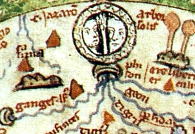 Psalter world map, paradise